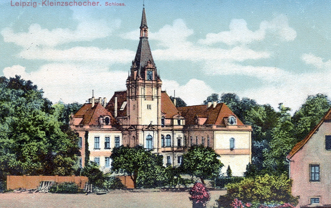 Postkarte, datiert 10.3.1917. Beschriftung: "Leipzig-Klein Zschocher - Schloss."